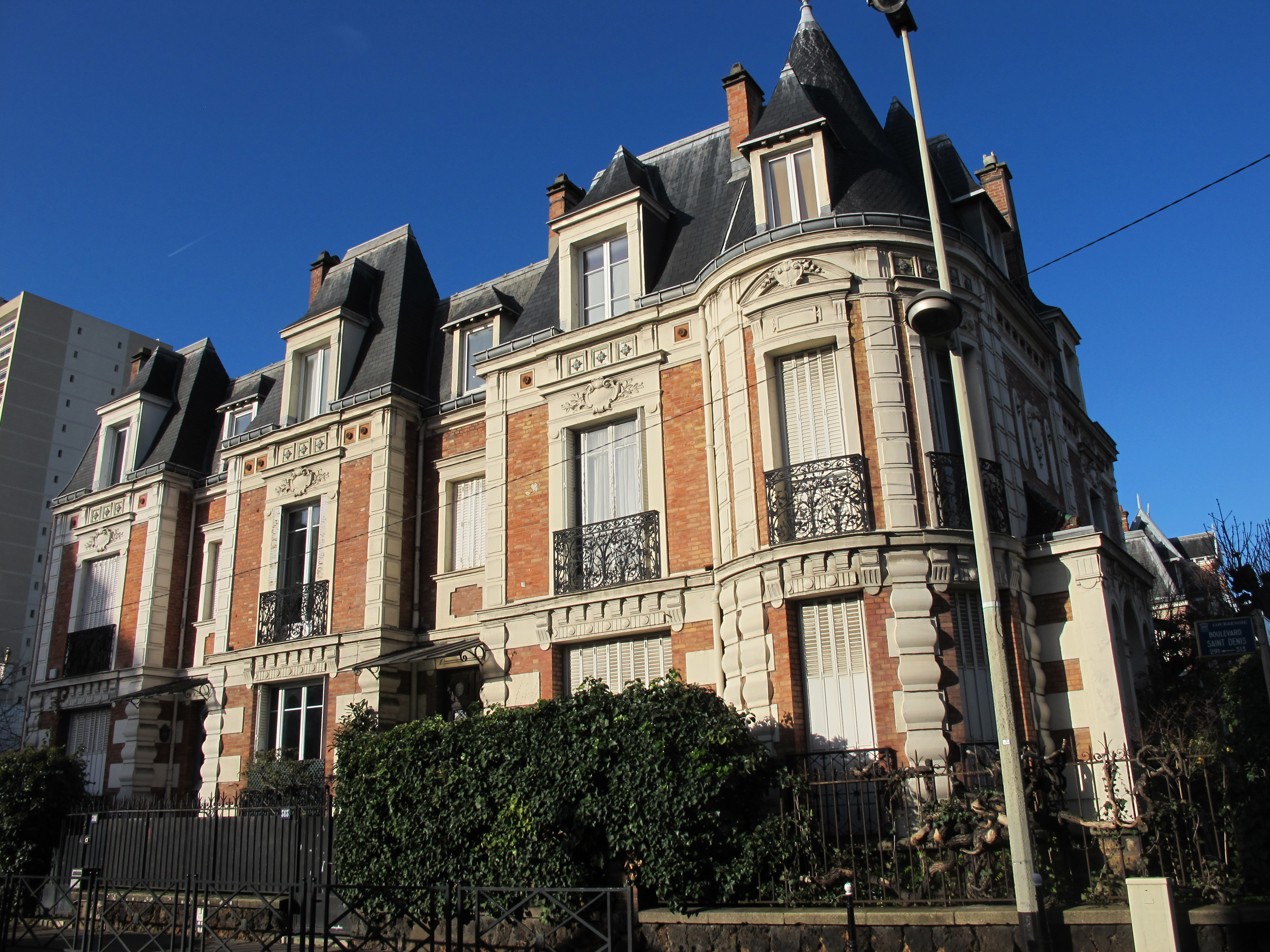 maison de Courbevoie classé au monument historique Référence Mérimée